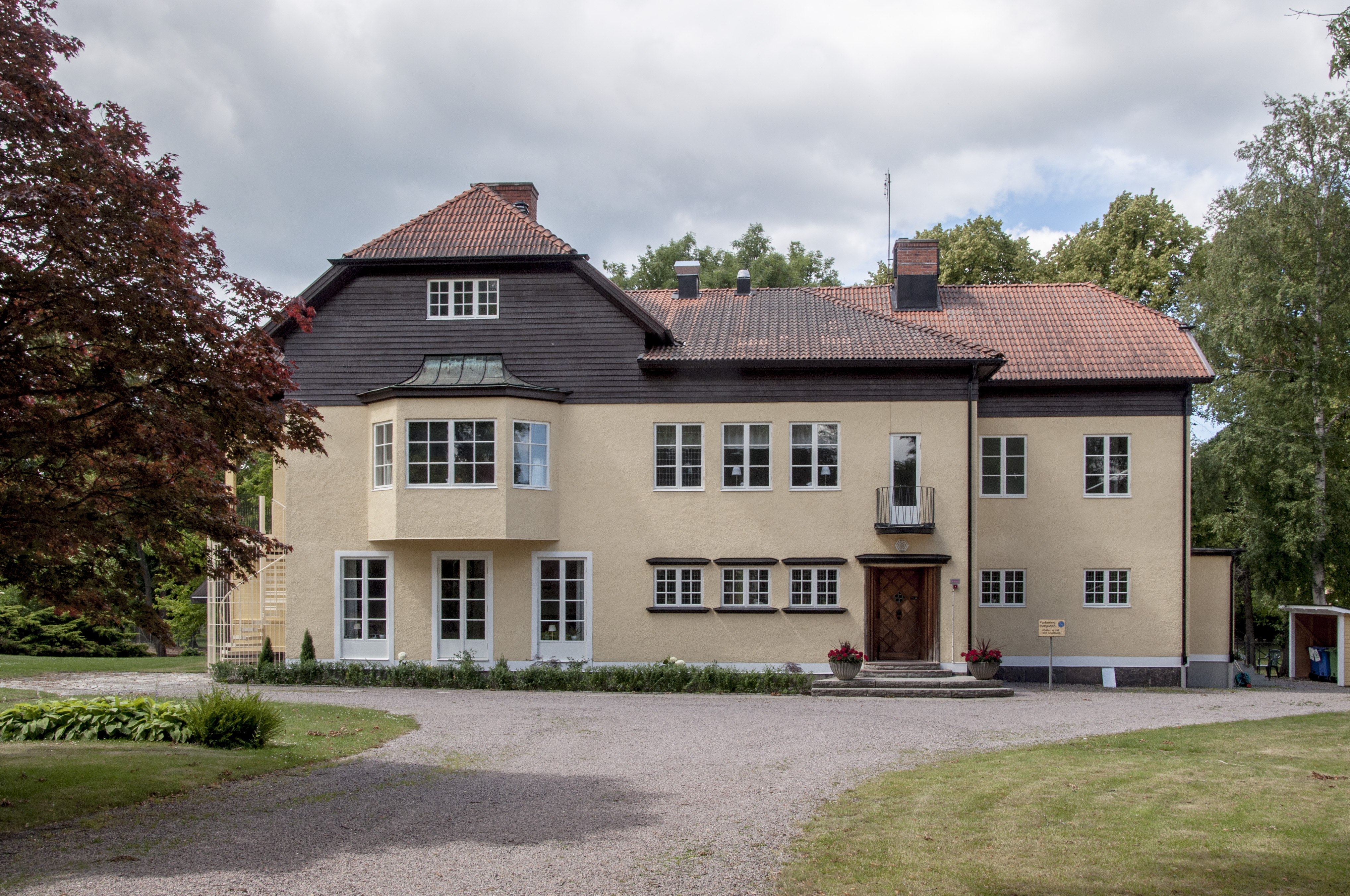 Stora Fredriksberg, Mariestad, f.d. disponentbostad för Katrinefors bruk. Arkitekt Kaj Christensen